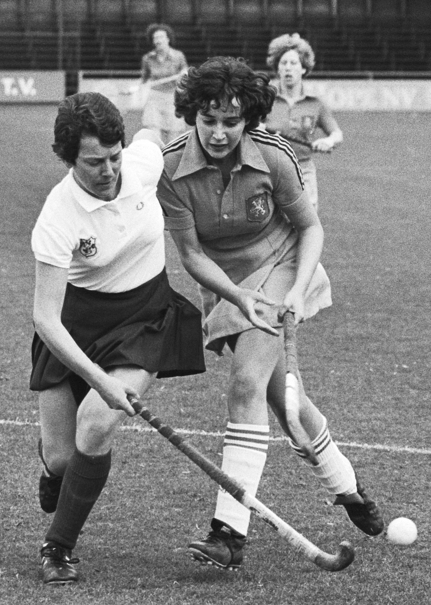 Nederland tegen Ierland, dameshockey 1-0, Margriet Bleijerveld (rechts) in duel met Ierse verdedigster